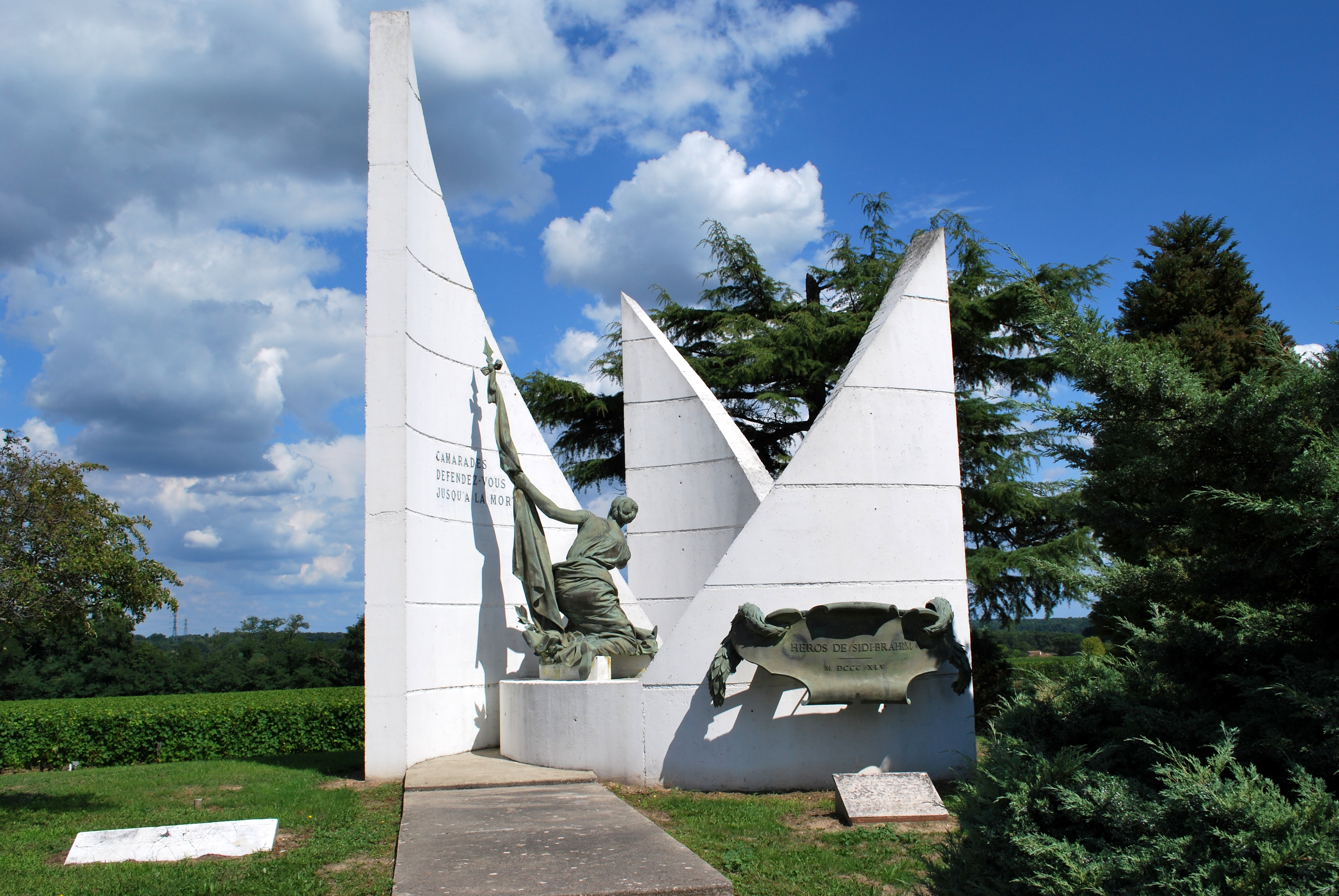 Périssac Monument aux morts de Sidi-Brahim